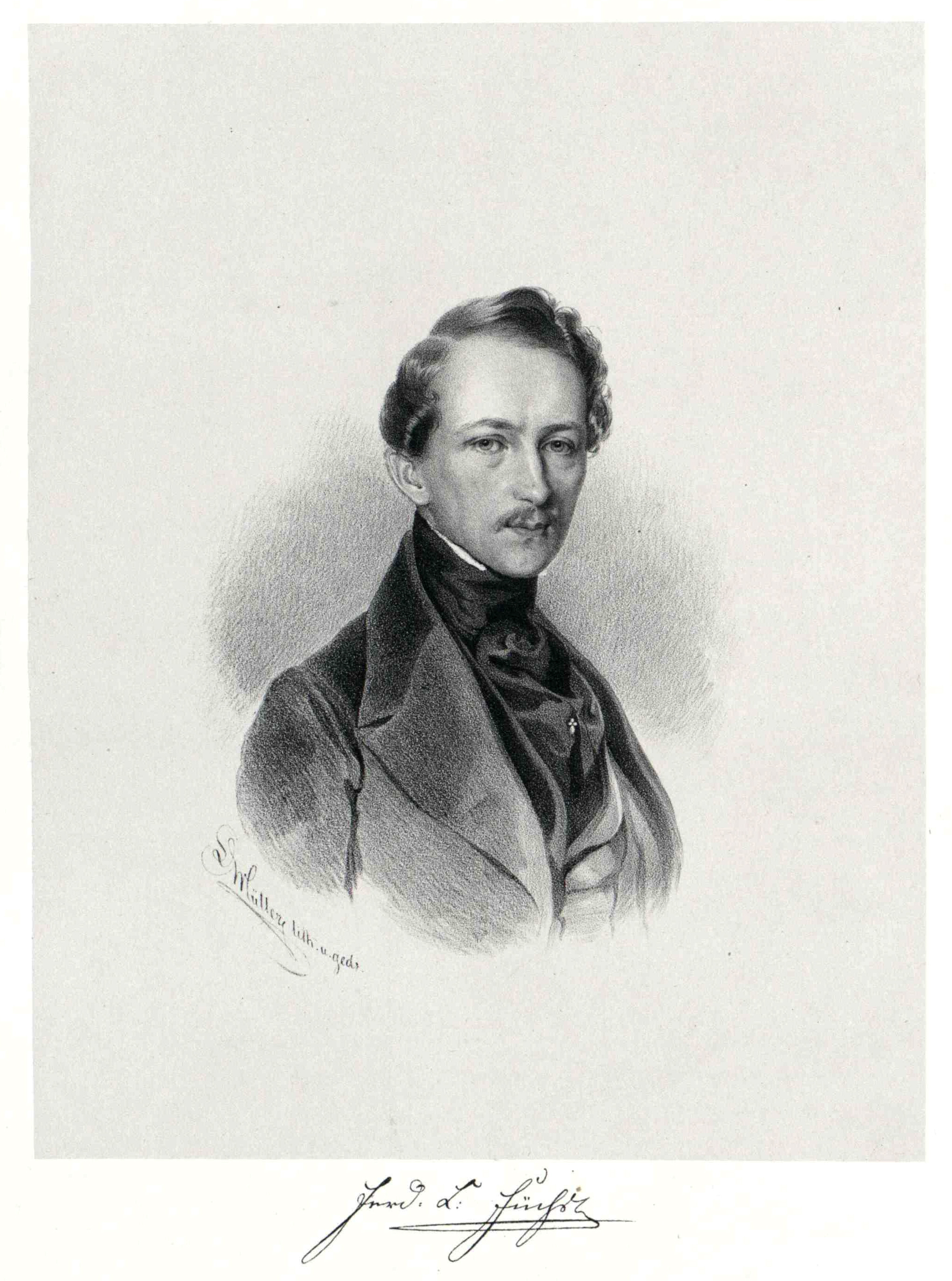 Karl Ferdinand Füchs; Wien, Österreichische Nationalbibliothek, Bildarchiv und Grafiksammlung, Porträtsammlung, Inventar-Nr. PORT_00155564_01